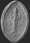 Héder Péter veszprémi püspök főpapi pecsétje